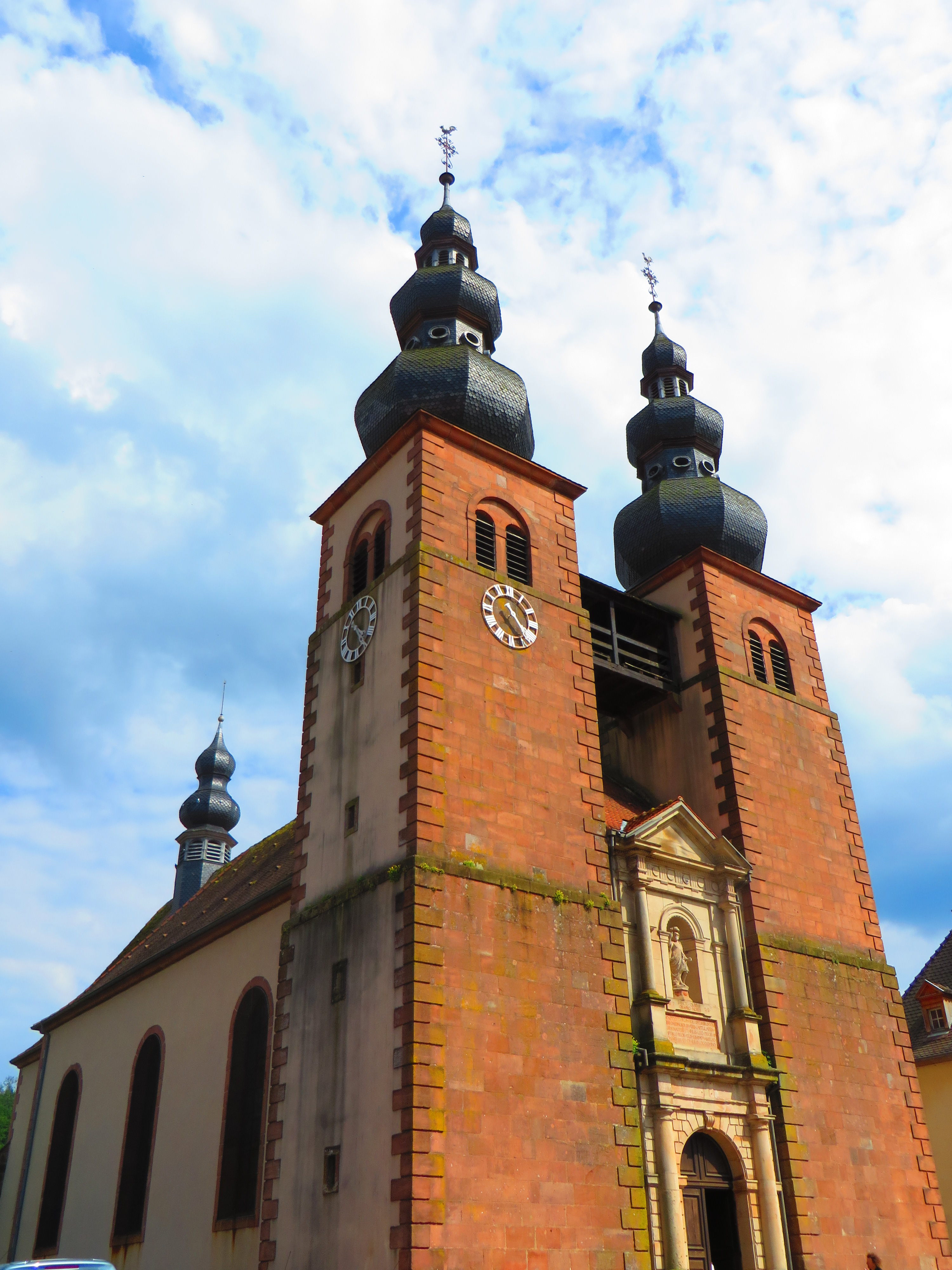 St Quirin eglise